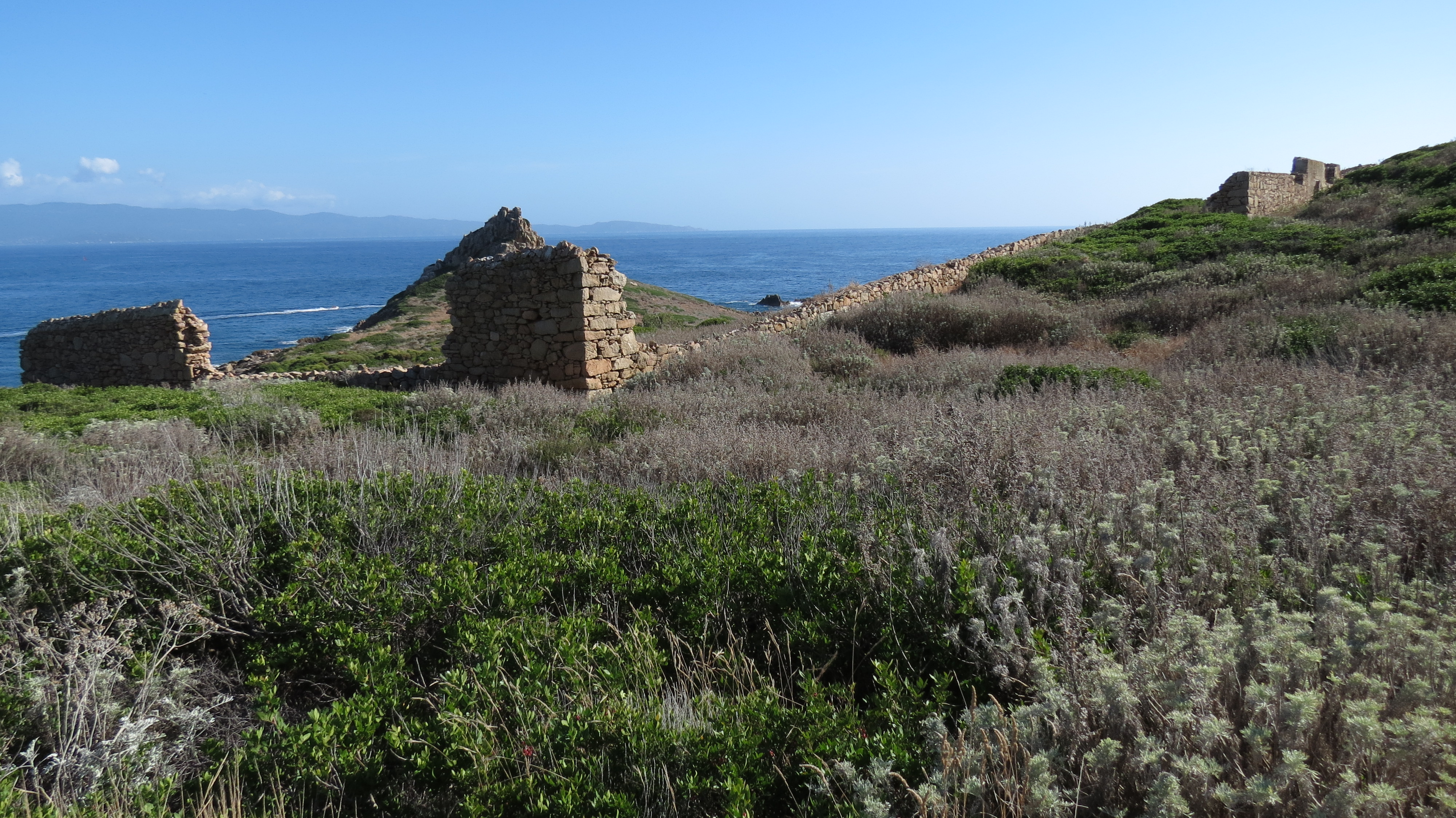 Ruines du lazaret du l'île principale de l'Archipel des Sanguinaires (Corse)